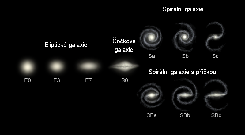 Hubbleova klasifikace galaxií: vlevo eliptické (E0-E7) a čočkové (S0), vpravo nahoře spirální (Sa-Sc) a vpravo dole spirální s příčkou (SB)